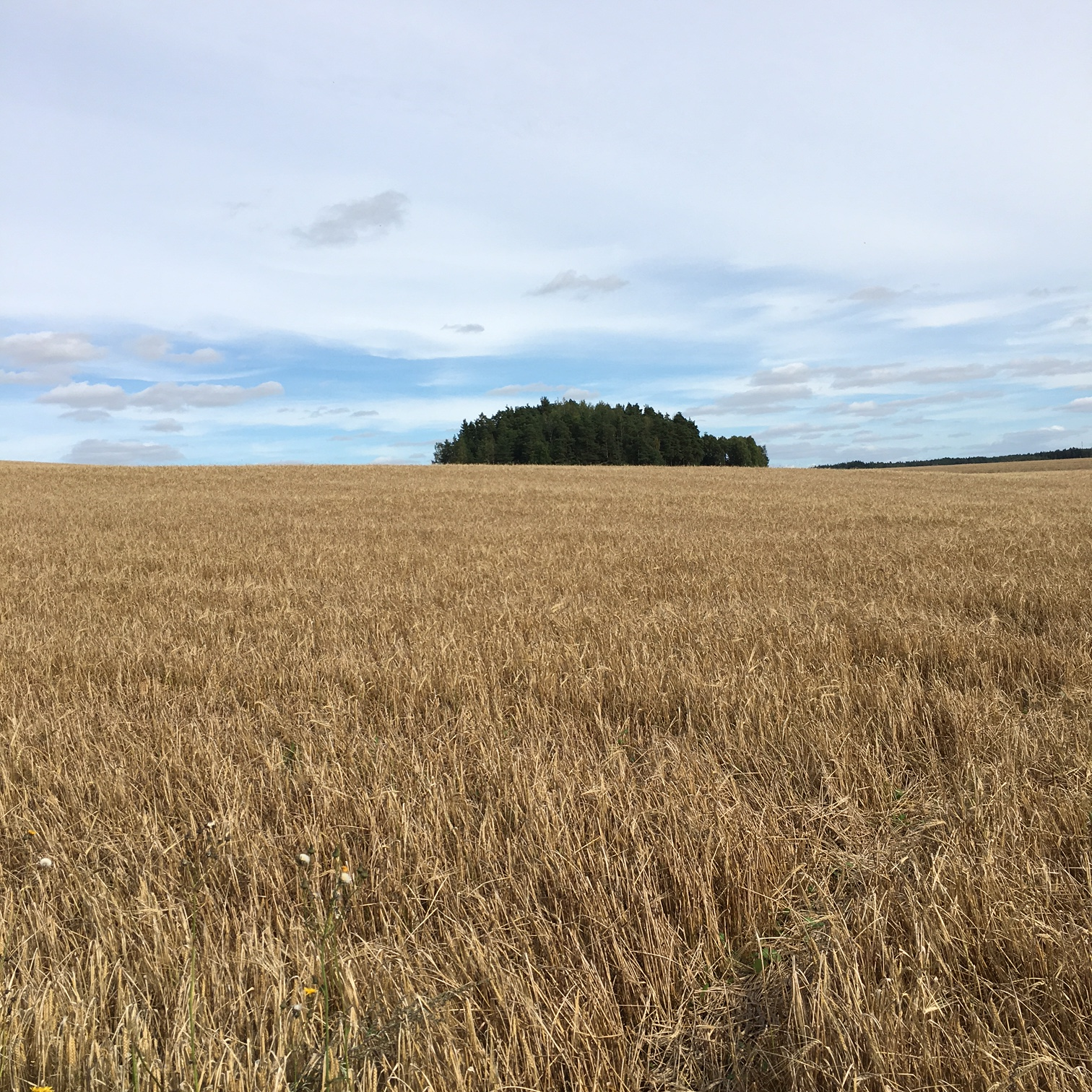 Ravattulan ristimäen arkeologiset kaivaukset.